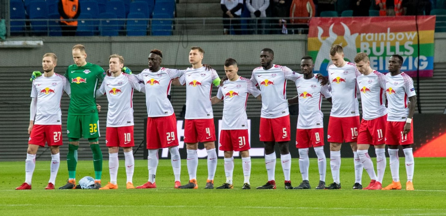 08.03.2018. Германия, Лейпциг, «РБ Арена». Лига Европы УЕФА 2017/18, 1/8 финала, «РБ Лейпциг» — «Зенит».